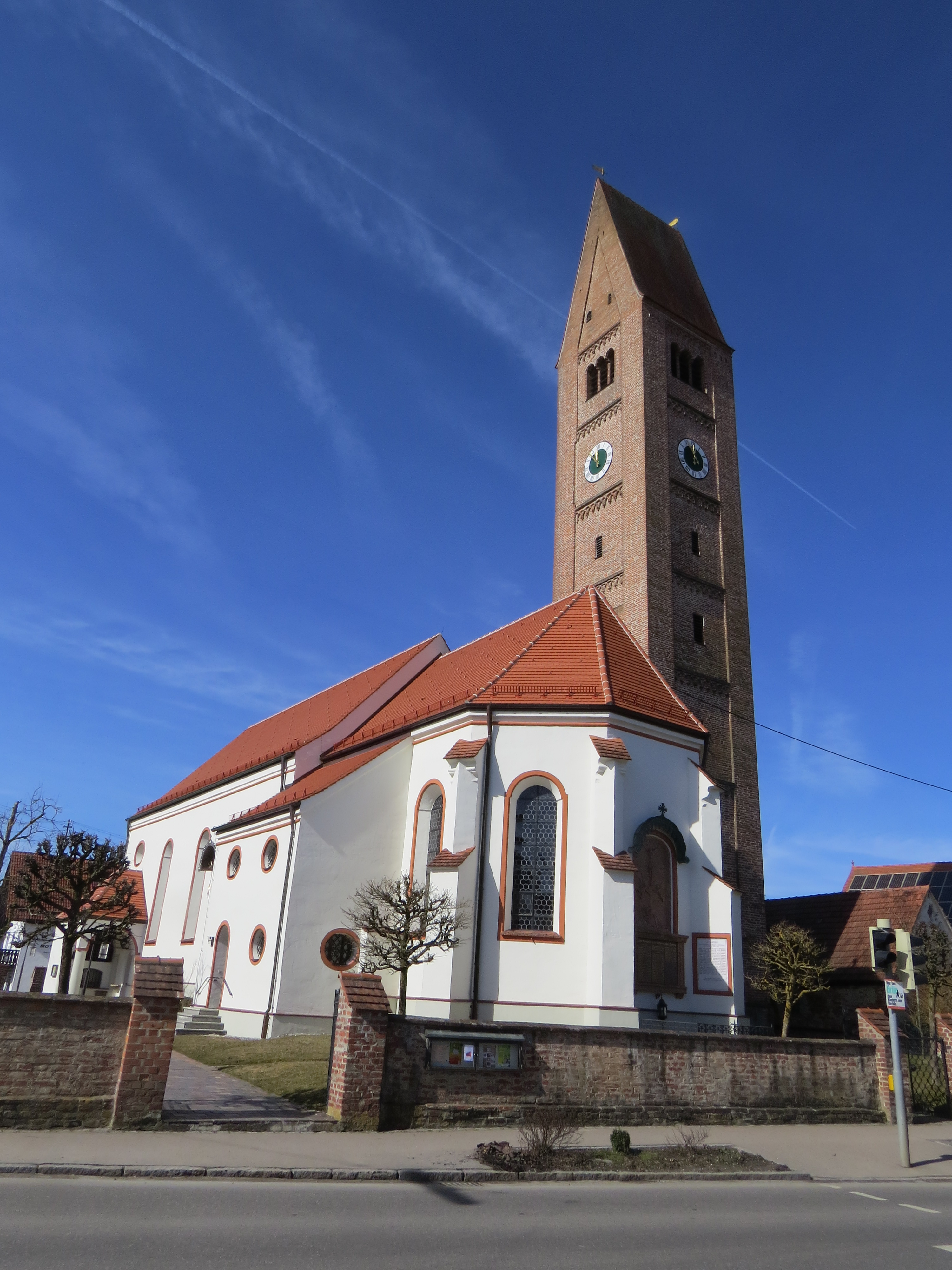 Pfarrkirche in Loppenhausen, Breitenbrunn